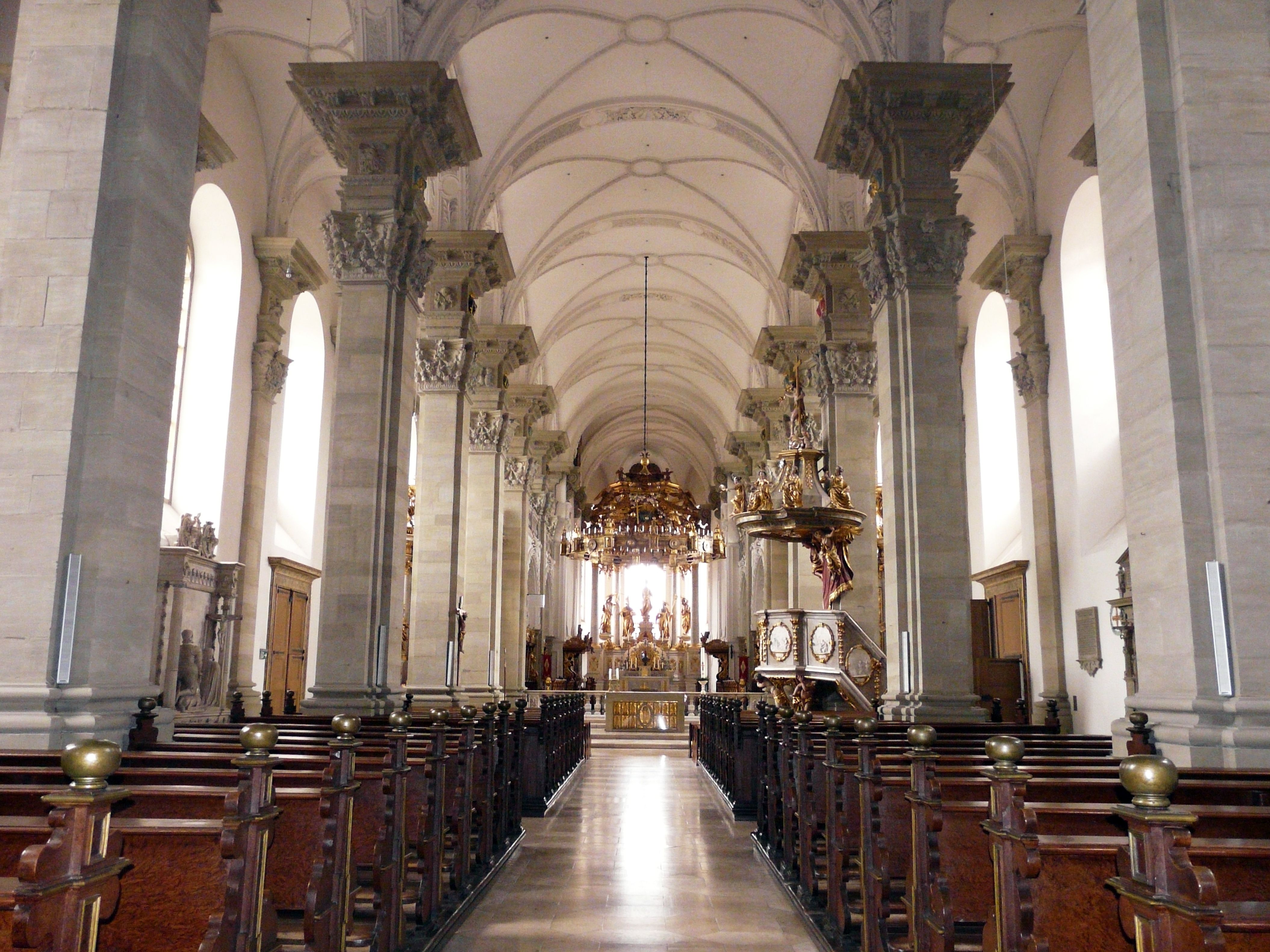 Центральный неф